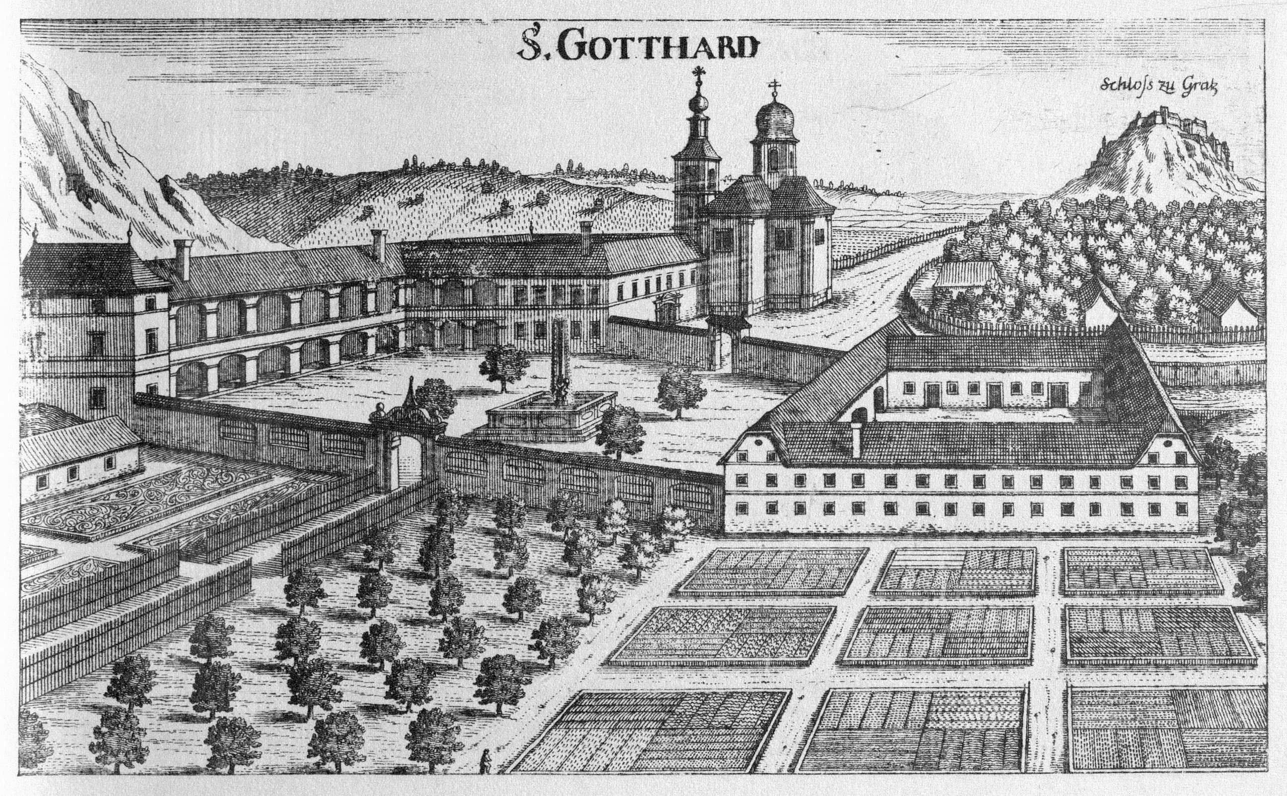 G. M. Vischers Käyserlichen Geographi, Topographia Ducatus Stiriae, Das ist: Eigentliche Delineation / und Abbildung aller Städte / Schlösser / Marcktfleck / Lustgärten / Probsteyen / Stiffter / Clöster und Kirchen / so es sich im Herzogthumb Steyrmarck befinden; Und anjetzo Umb einen billichen Preyß zu finden seynd Bey Johann Bitsch Universitäts Buchhandlern / Auff dem Juden=Platz bey der guldenen Saulen. Graz 1681 Die Nummerierung der Dateien folgt der alphabetischen Reihung der Ortsnamen